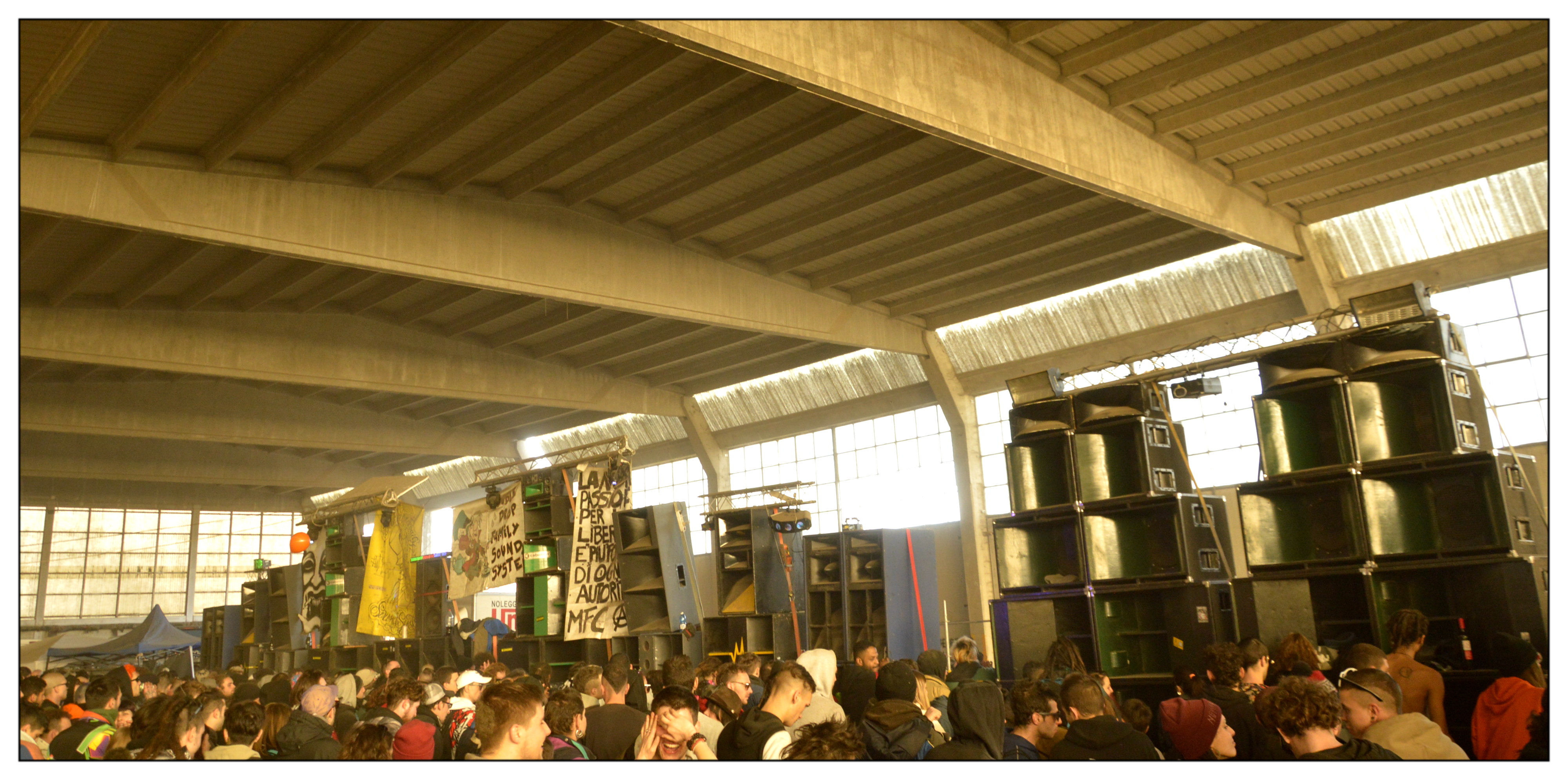 Rave di capodanno. Nord Italia.